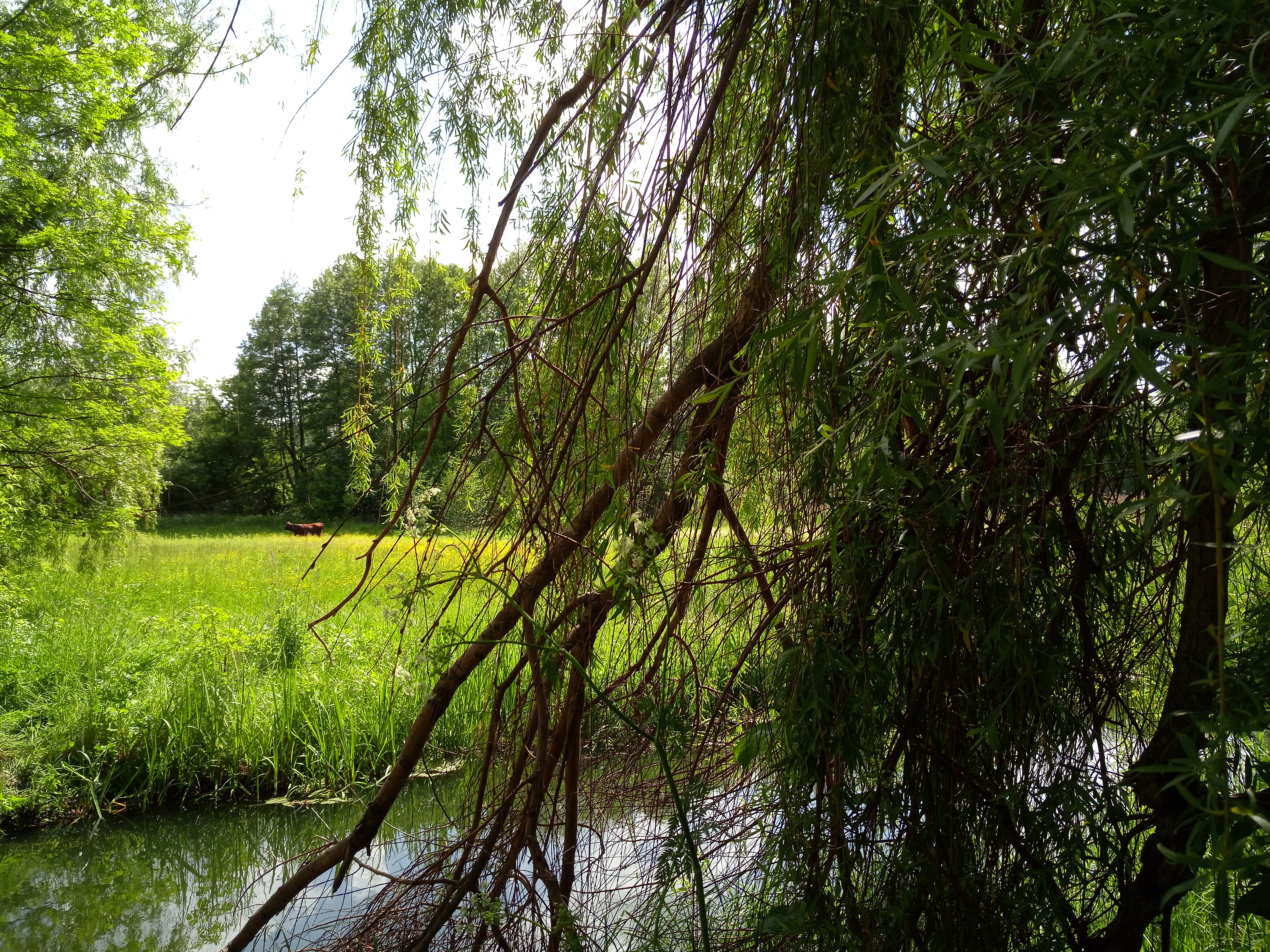 Річка Вербич у межах села Гунчі (3)